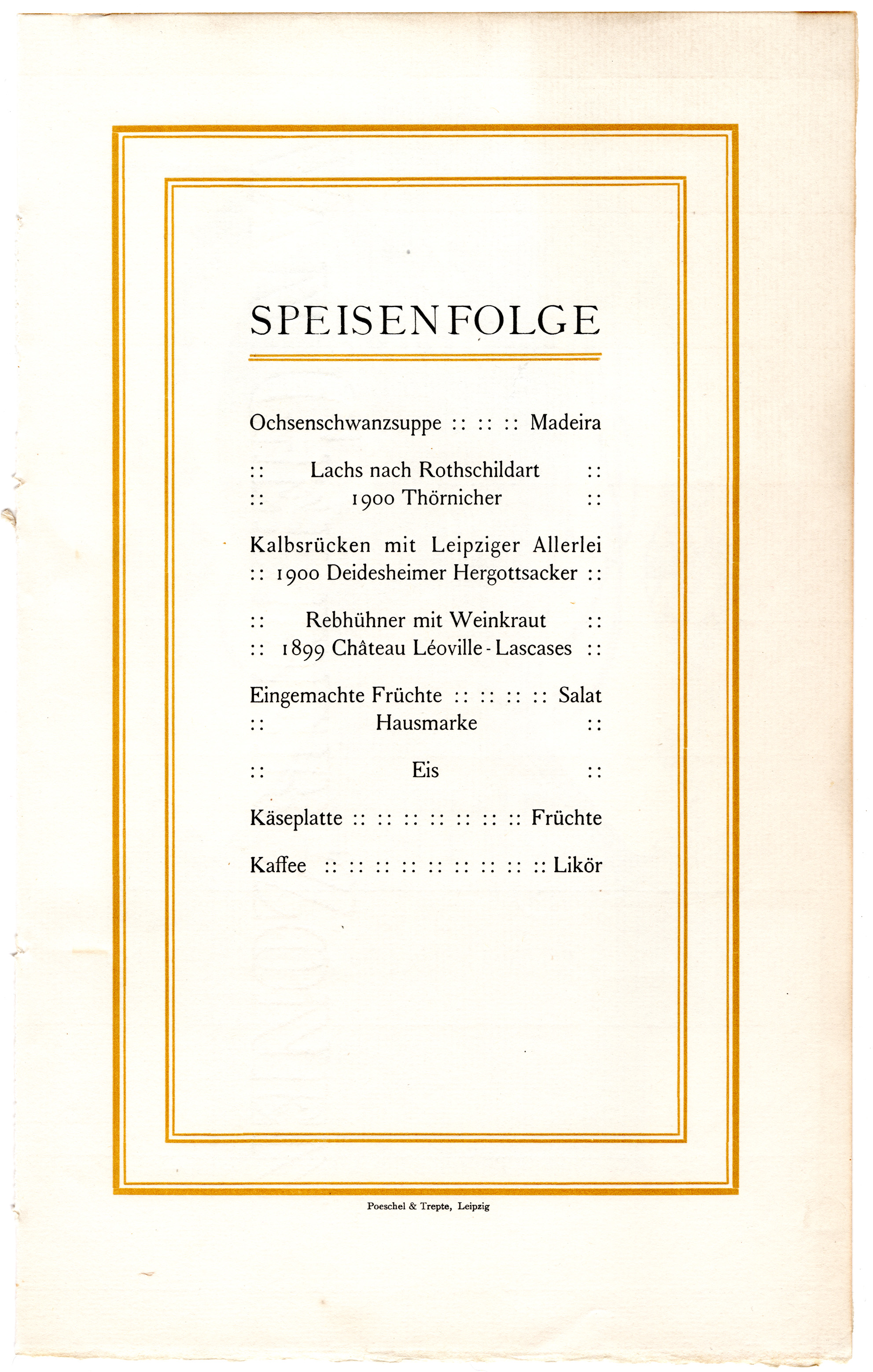 Speisenfolge im Ratskeller Leipzig bei der Eröffnung des Neuen Rathauses 1905